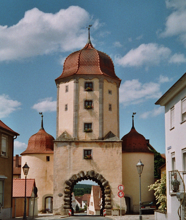 Das Pleinfelder Tor in Ellingen/Bayern. Selbst gemachte Aufnahme von Juli 2005 des ursprünglichen Uploaders, Ausschnitt um das Gebäude zu fokussieren.